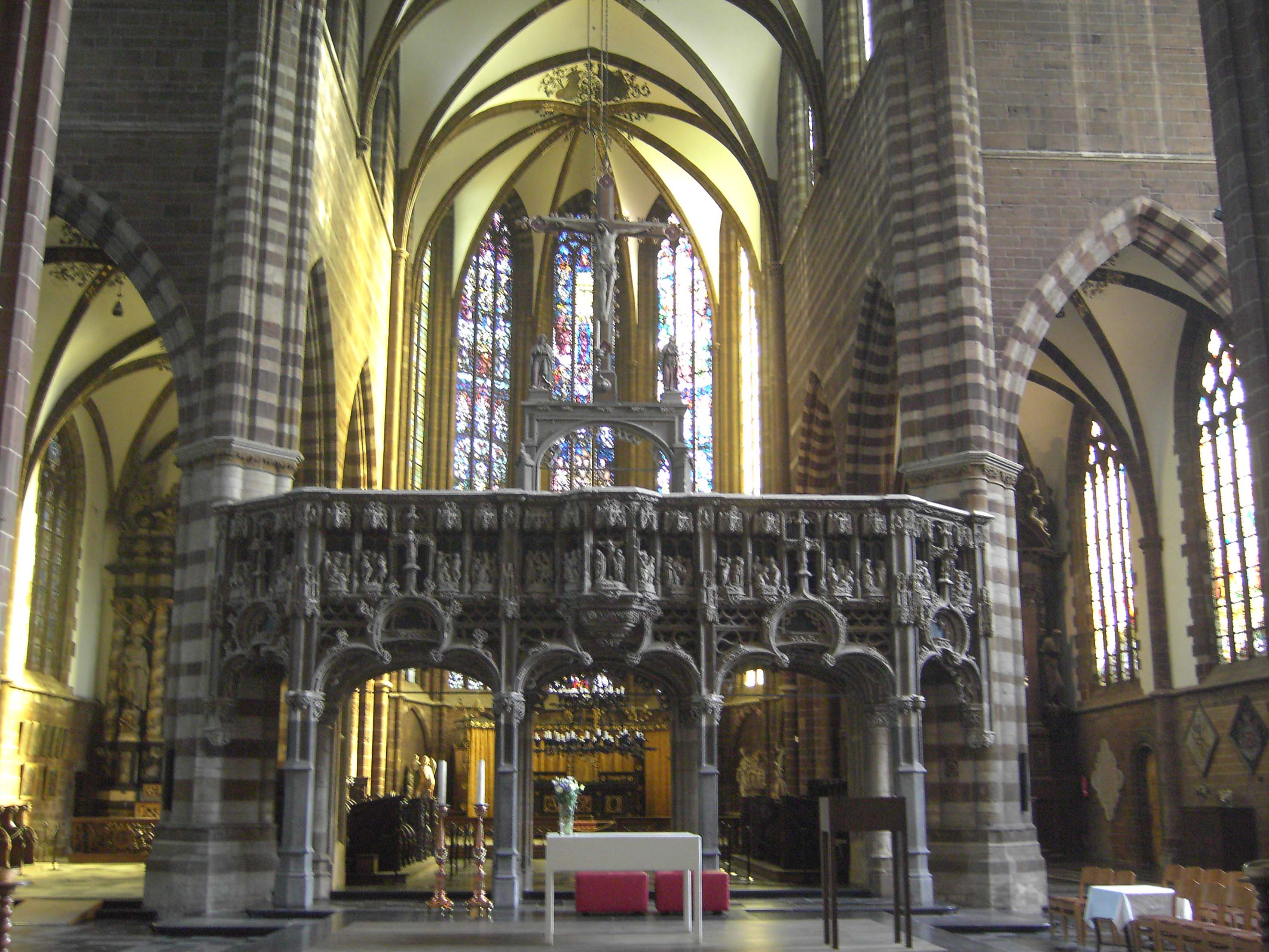 Aarschot - België - Onze Lieve Vrouwkerk, koor van de hoofdkerk van Aarschot.